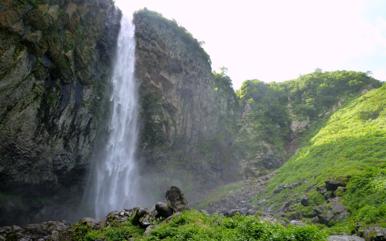 下流から見上げる百四丈滝